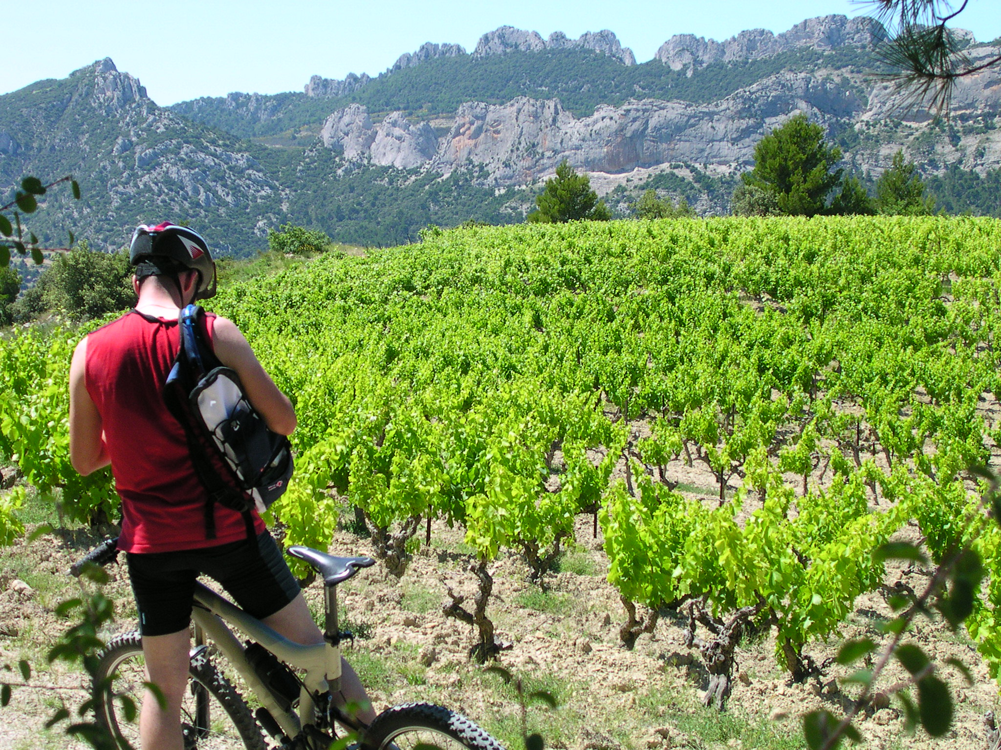 Œnotourisme dans les dentelles de Montmirail